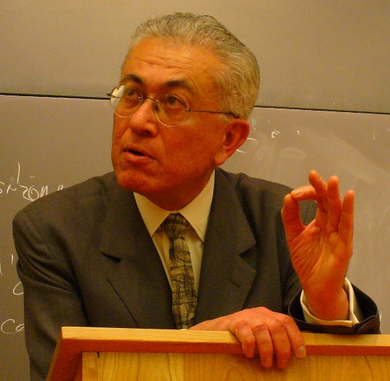 Roberto Mangabeira Unger (1947)